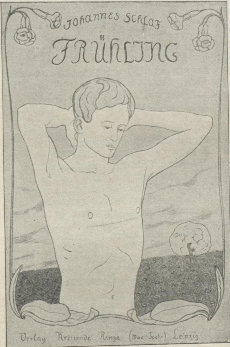 Emil Rudolf Weiß Buchtitel zu Johannes Schlaf Frühling möglicherweise die Erstausgabe von 1896